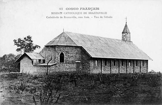 Mission catholique de Brazzaville : cathédrale de Brazzaville, non finie ; vue de l'abside. 116 cartes postales du Congo français, don 1907.